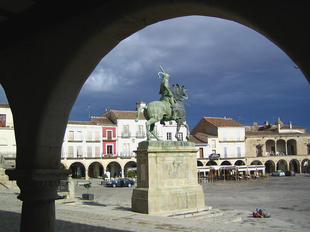 Statue de Francisco Pizarro à Trujillo, Extremadura, España.